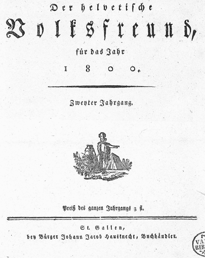 Helvetischer Volksfreund, St. Gallen 1800.